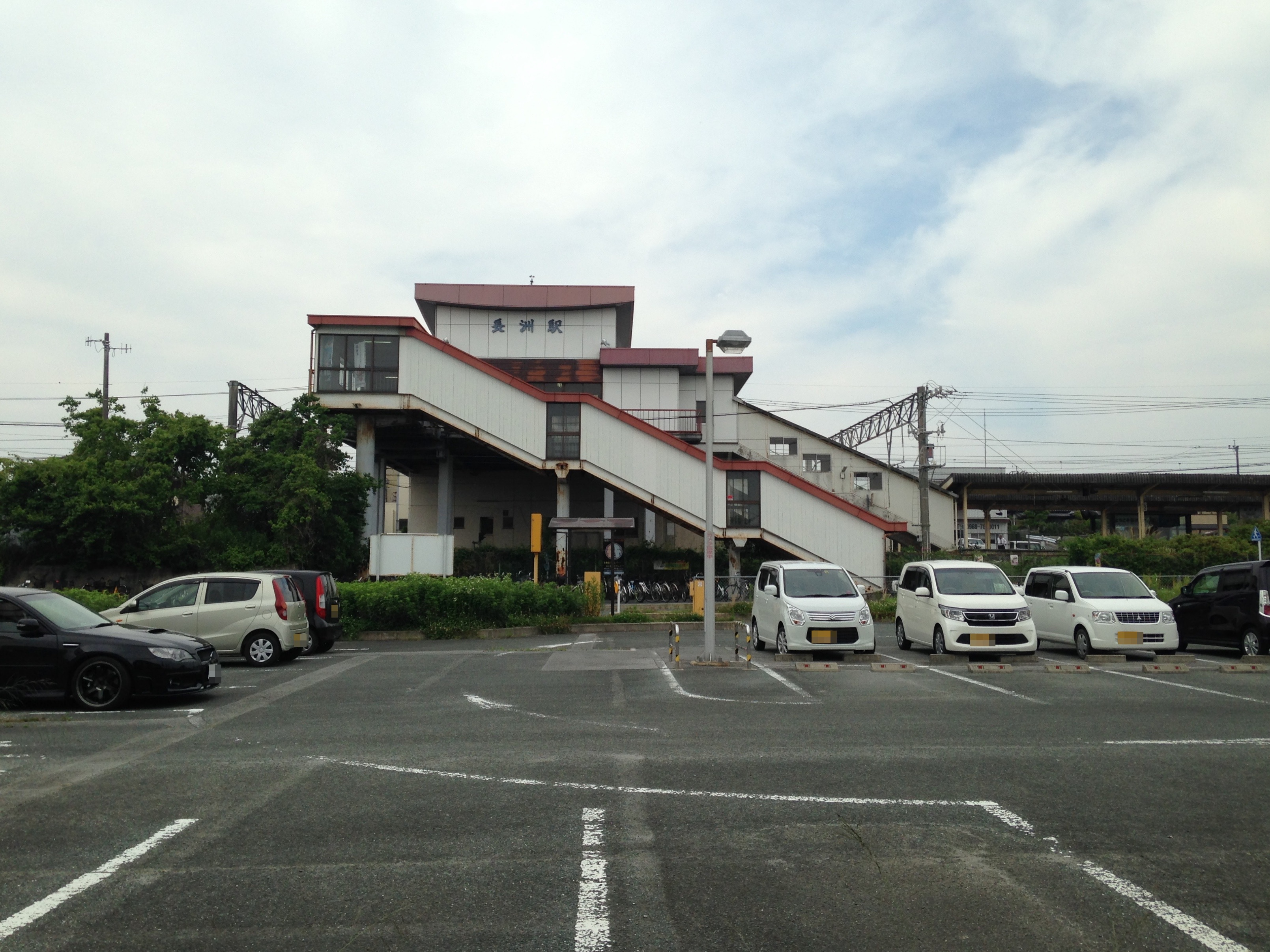 長洲駅駅舎